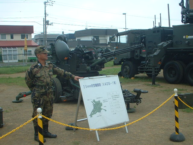 JASDF 20mm VADS（Vulcan Air Difense System） (M167 VADS.